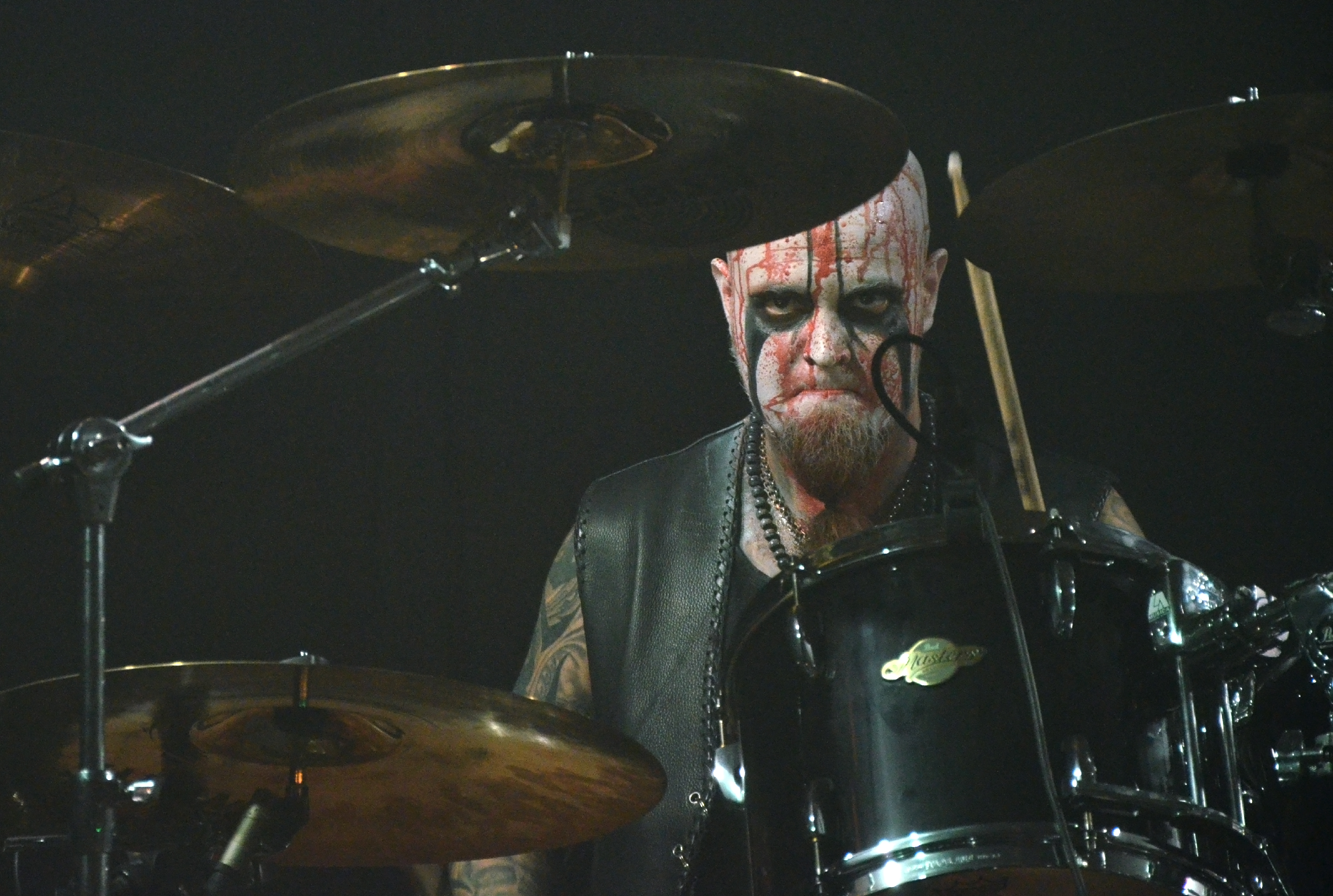 Archgoat at the Throne Fest 2016, in Kuurne, the 14th of May 2016.